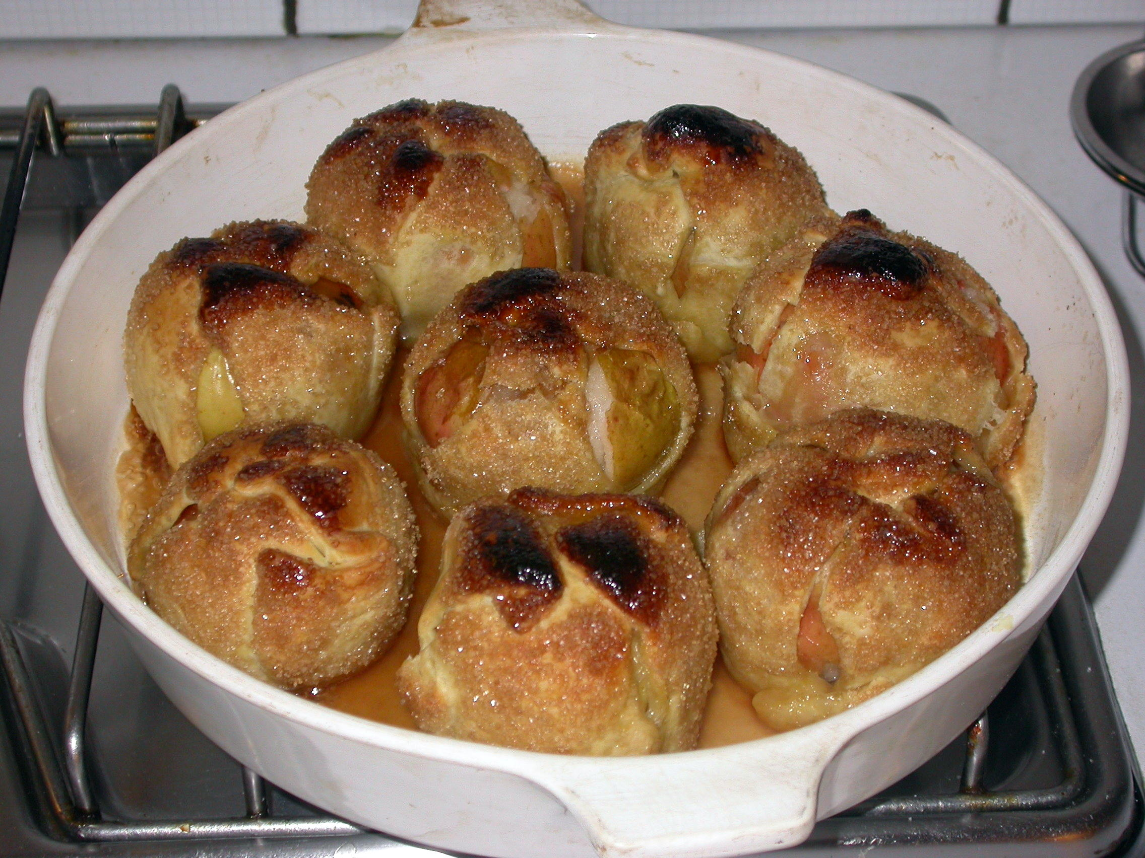 Bourdelots (Pommes au four de Normandie)